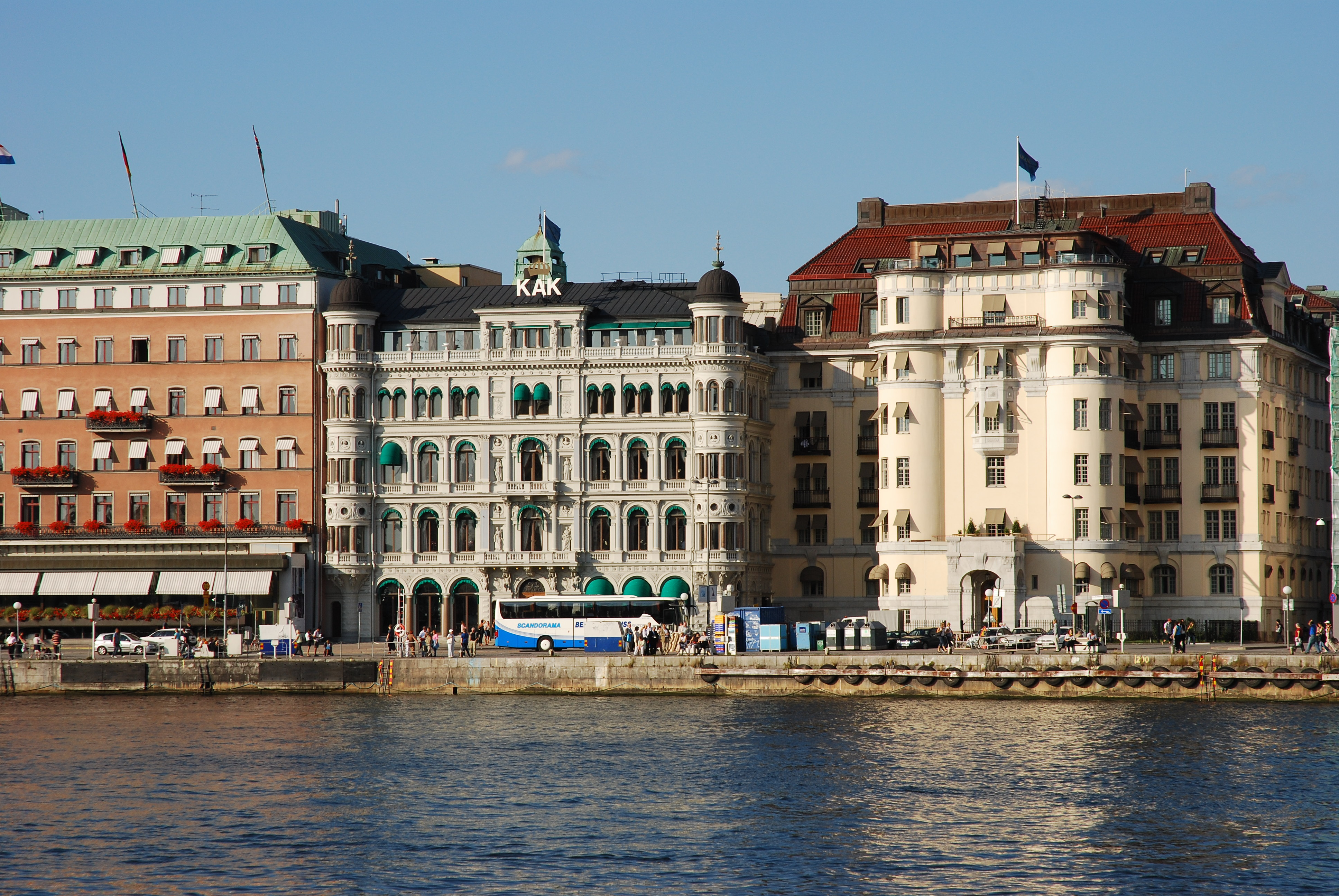 Maison Bolinder, Stockholm